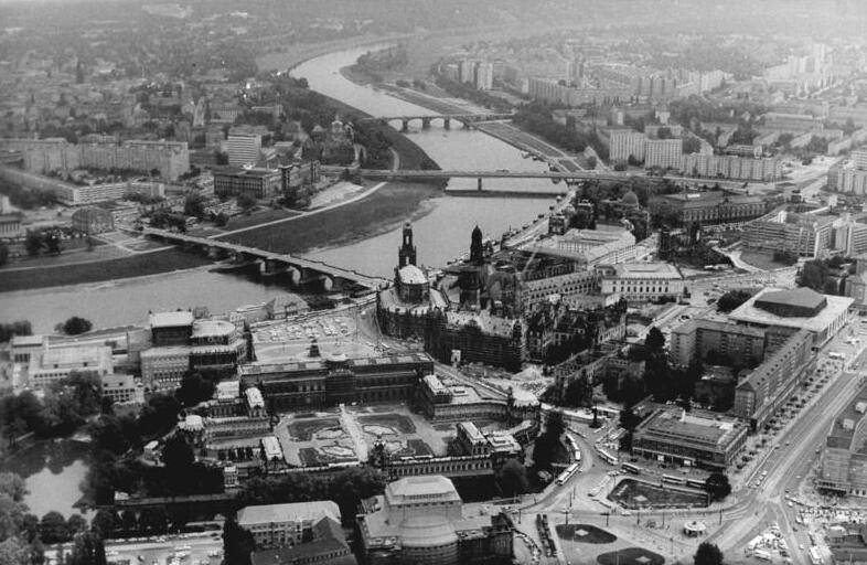 Dresden, Blick auf Altstadt und Neustadt ADN-Hiekel 16.5.90-Dresden: Luftbildaufnahme- Blick in Richtung Nord-Ost- Die Elbe trennt die Neustadt (links oben) von der Altstadt mit Zwinger, Schloß und Kathedrale. Rechts der Postplatz. (Luftbildnummer ZLB 773-90)